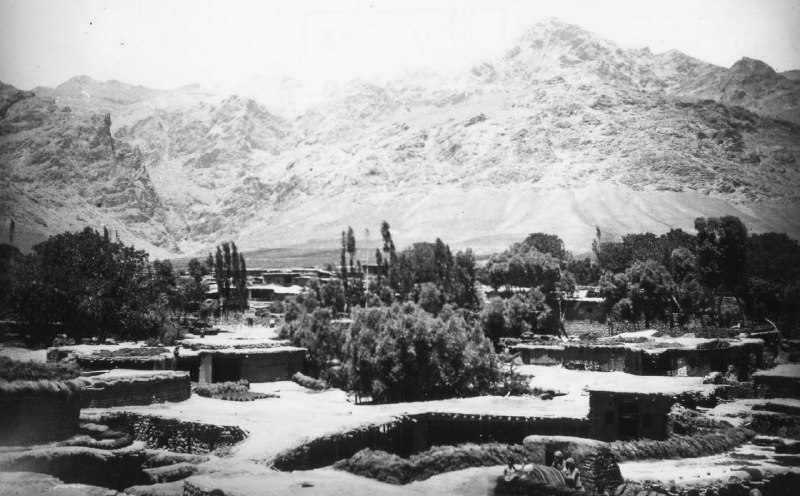 تصویر قدیمی از فریدونشهر, مربوط به حدود یک قرن پیش